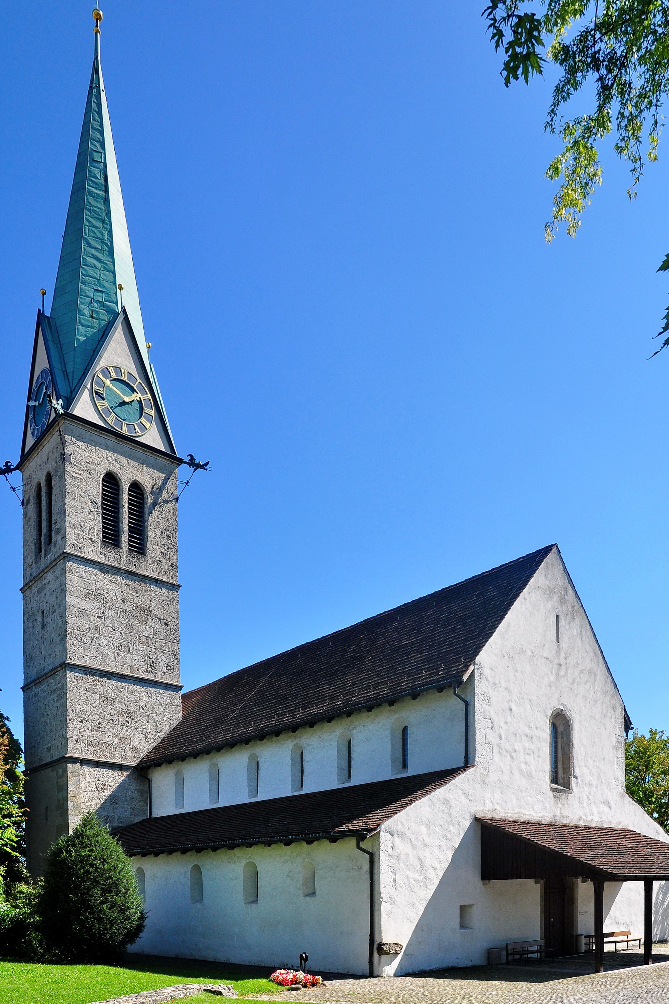 Reformierte Kirche St. Arbogast, Obere Hohlgasse in Winterthur (Switzerland)